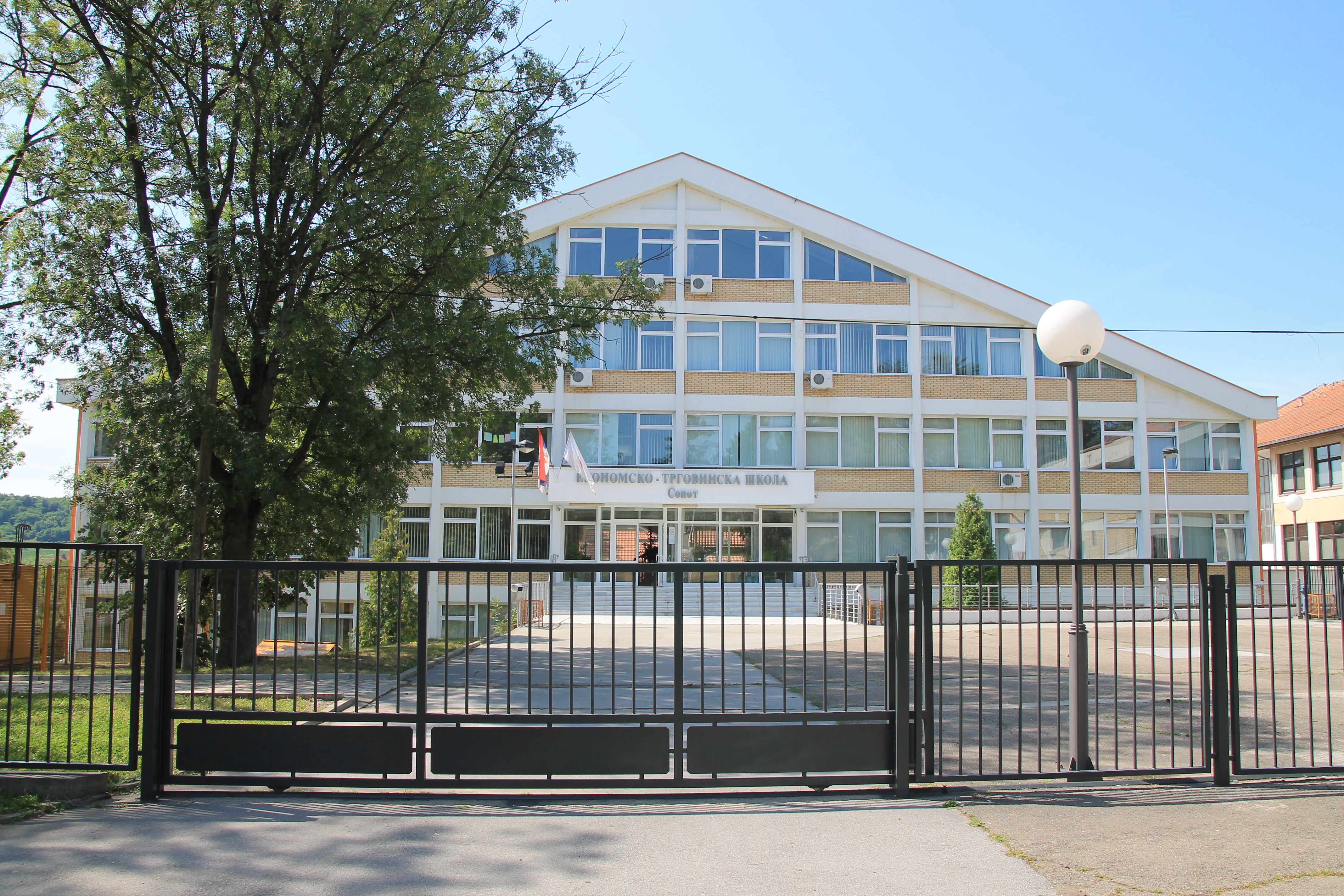 Sopot, Belgrade